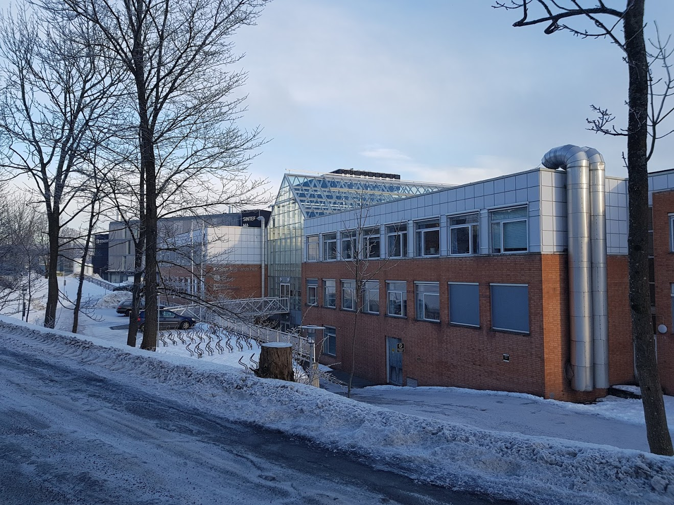 Kristen Nygaards Hus på Blindern i Oslo